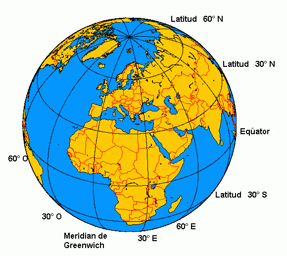 Traduch per Cedric31